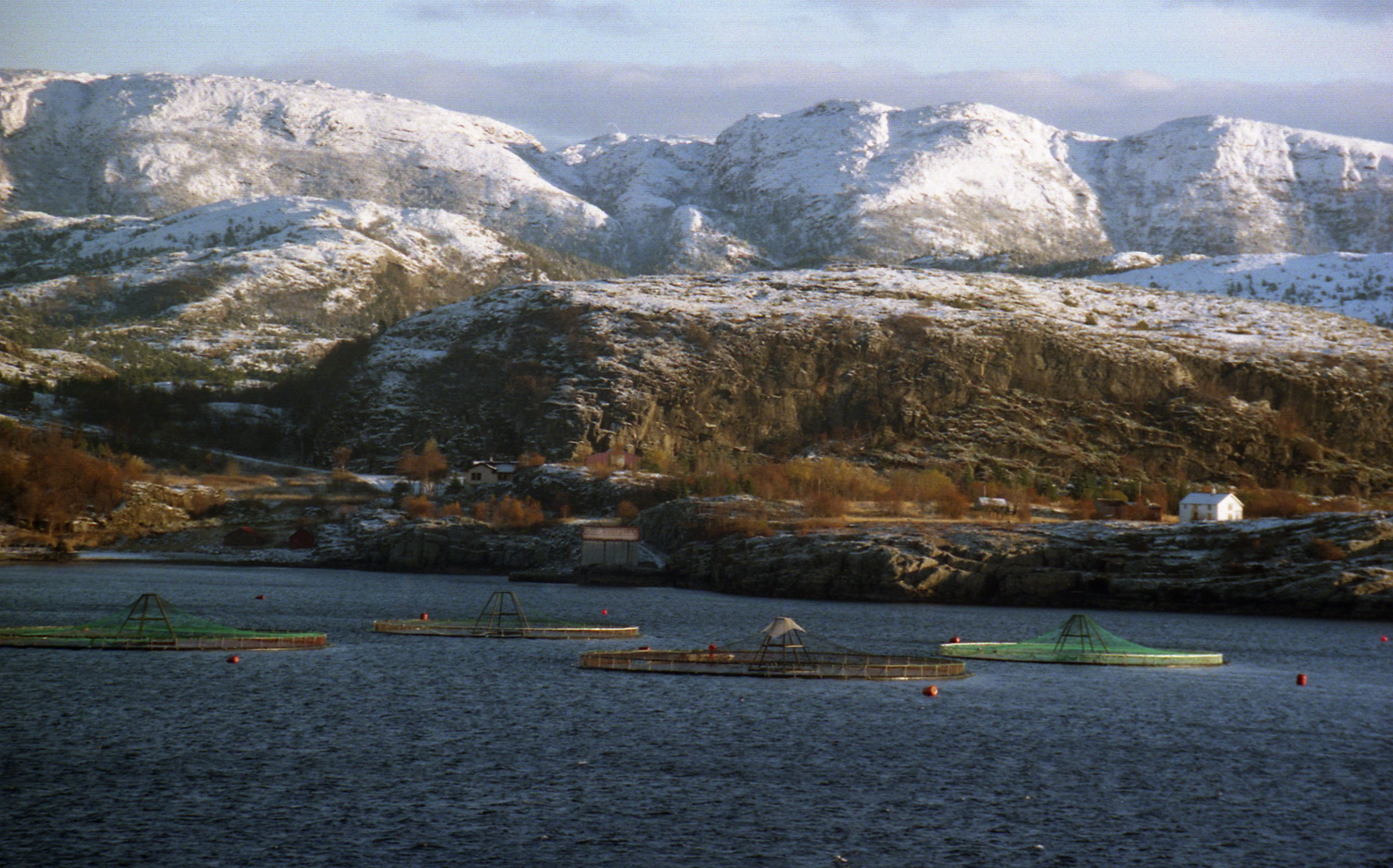 Lachsfarm vor Norwegens Küste (zwischen Trondheim und Rørvik)